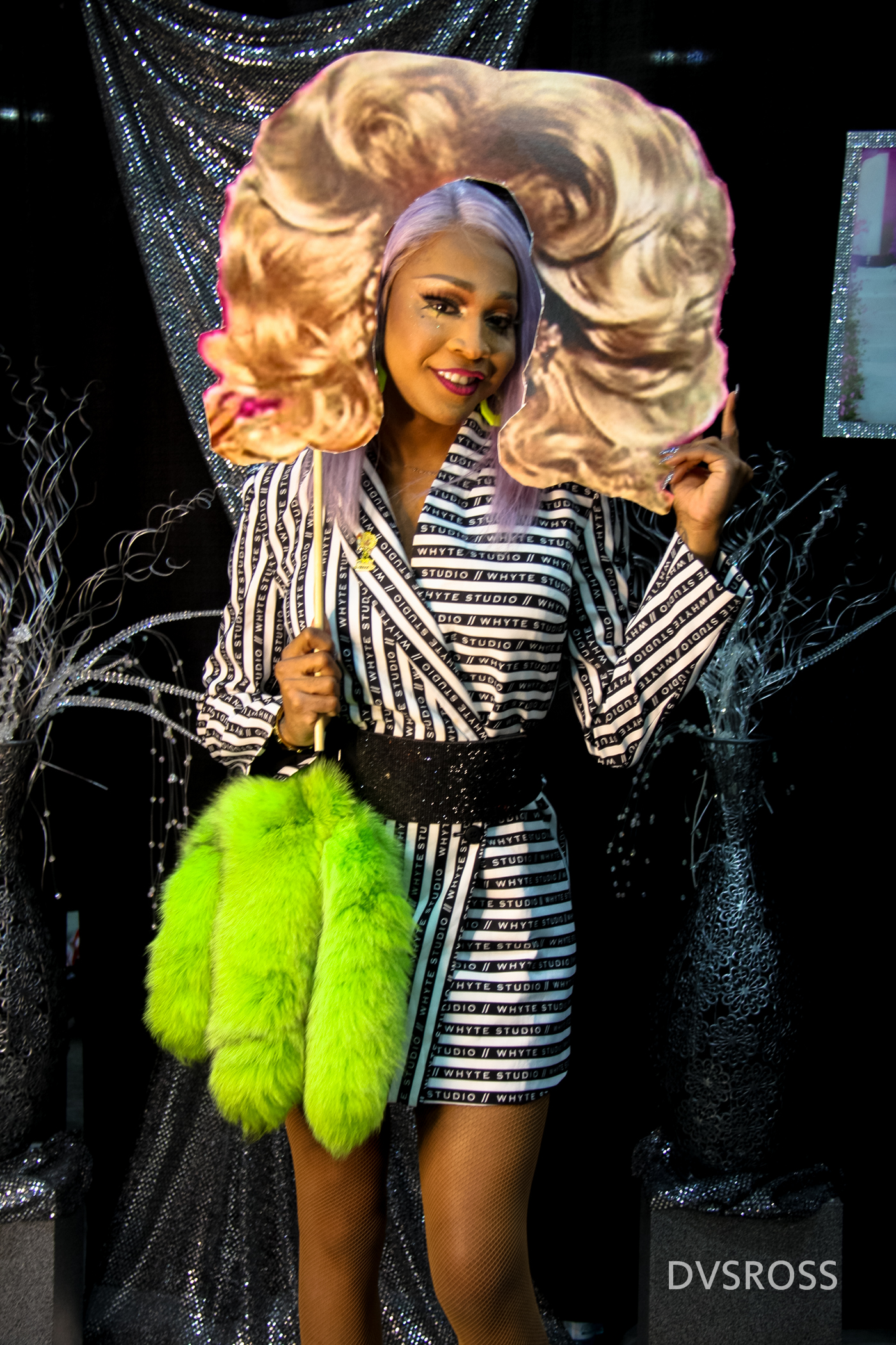 Rupaul DragCon 2019 - Los Angeles